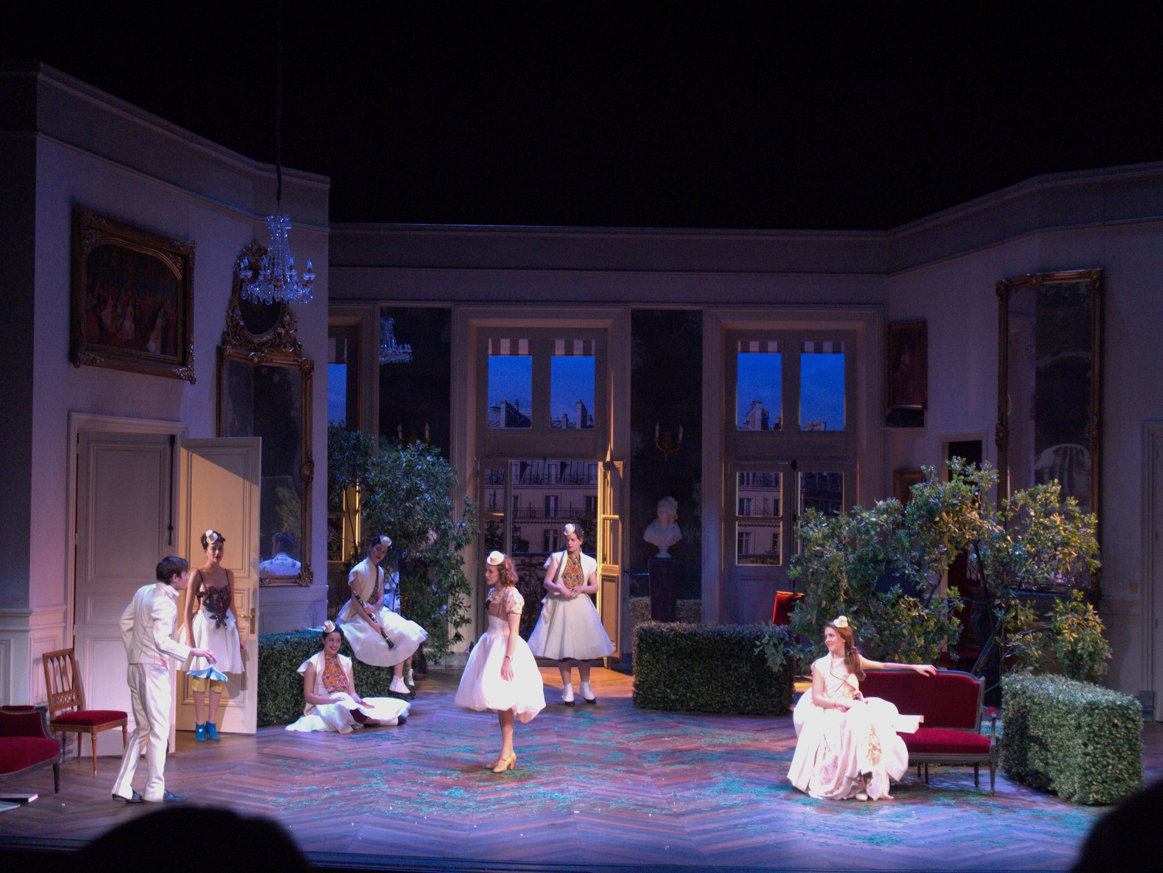 Répétition à la Comédie-Française en janvier 2015